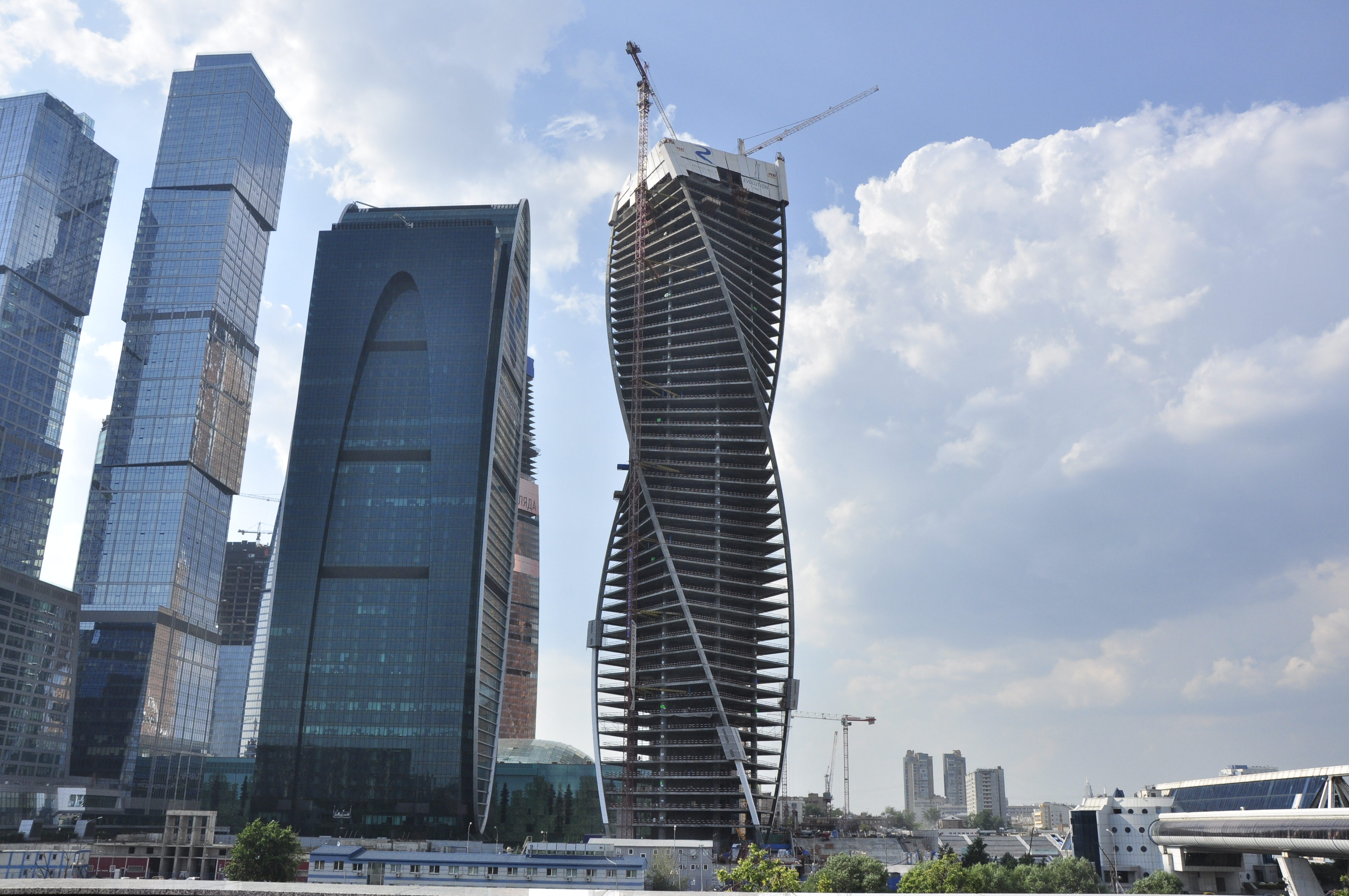 строился 49-й этаж